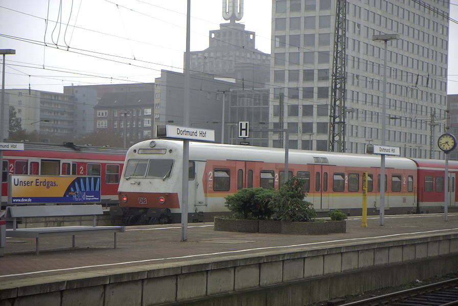 Steuerwagen der S-Bahn Rhein-Ruhr im Orange-kieselgrauen Design in Dortmund Hbf